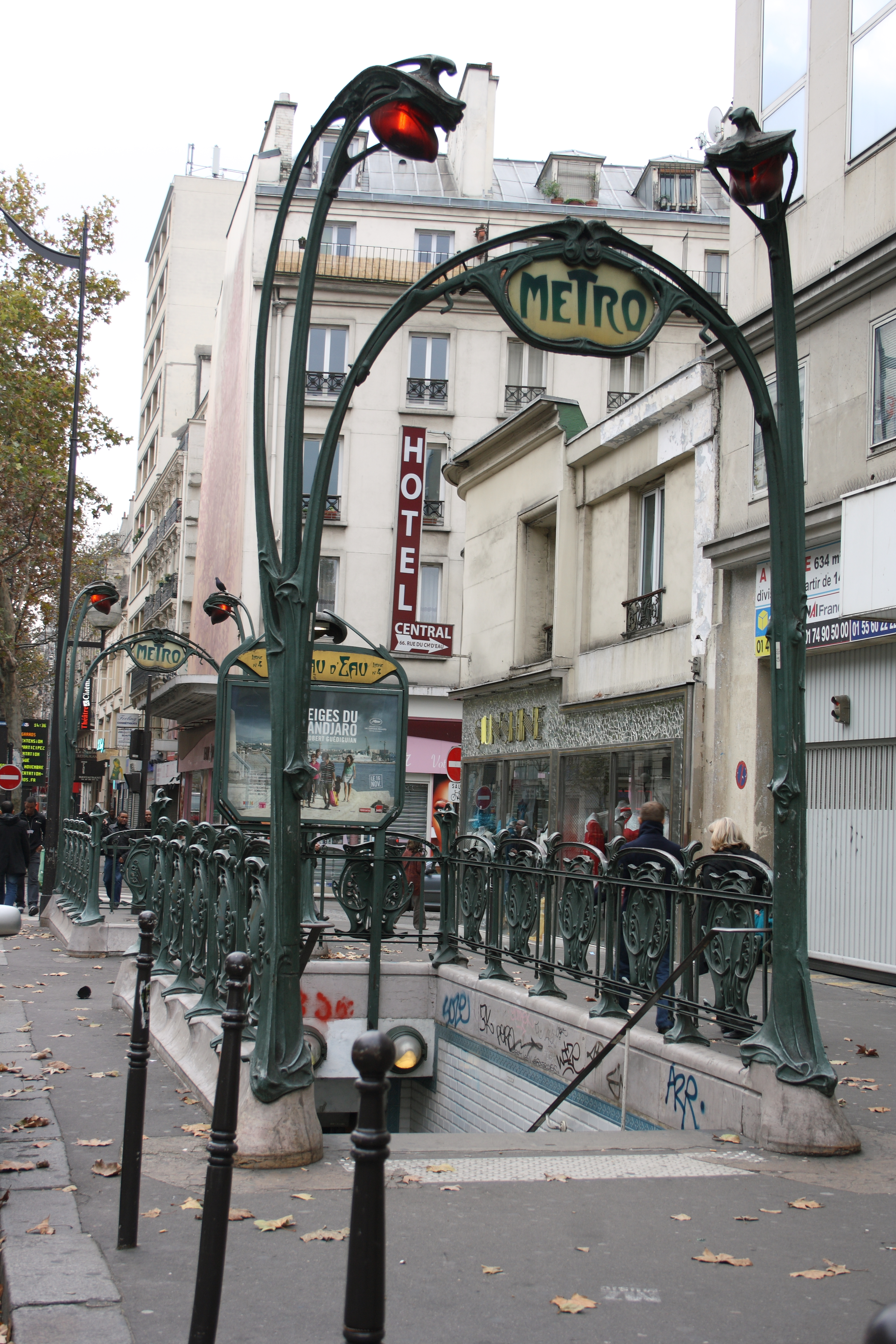 Paris; Metroeingang Château d'Eau 49-51 Boulevard de Strasbourg, gestaltet von Hector Guimard